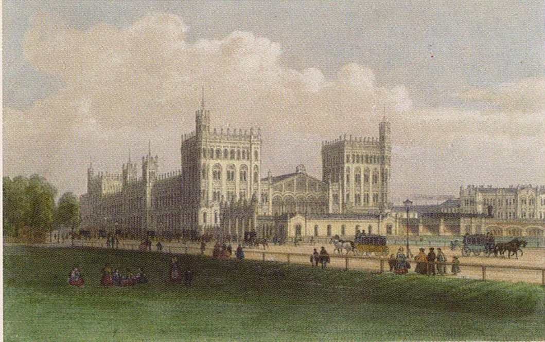 Der Nordbahnhof in Wien.